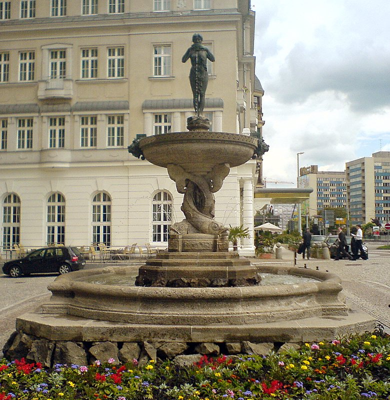 Villersbrunnen in Leipzig (Gesamtansicht)